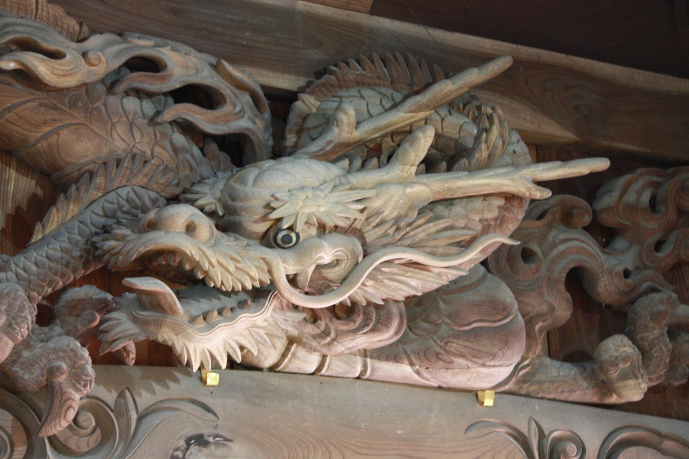 西光蜜寺（京都府南丹市）の竜＝中井権次5代目正忠作